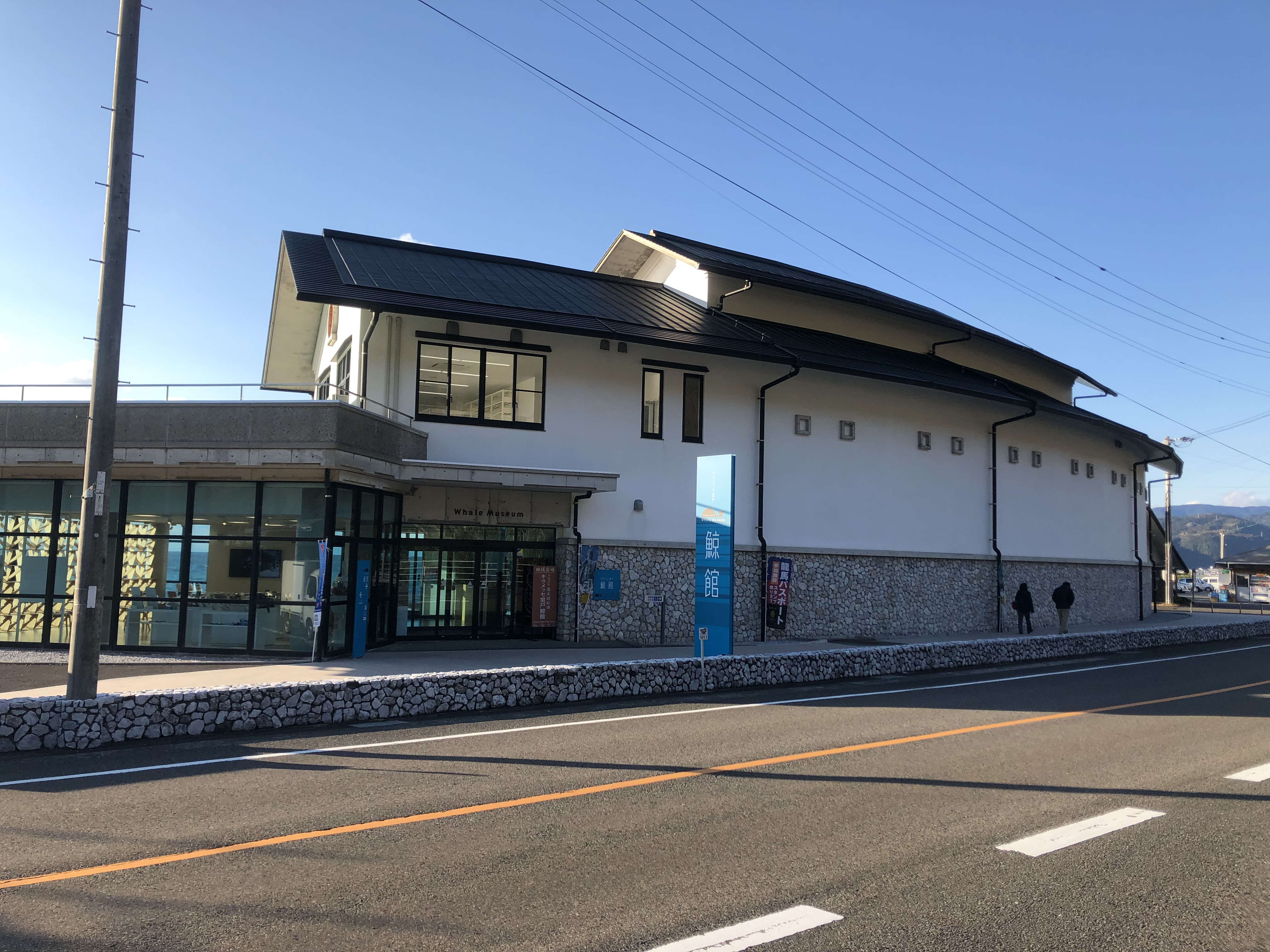 道の駅キラメッセ室戸の鯨館。